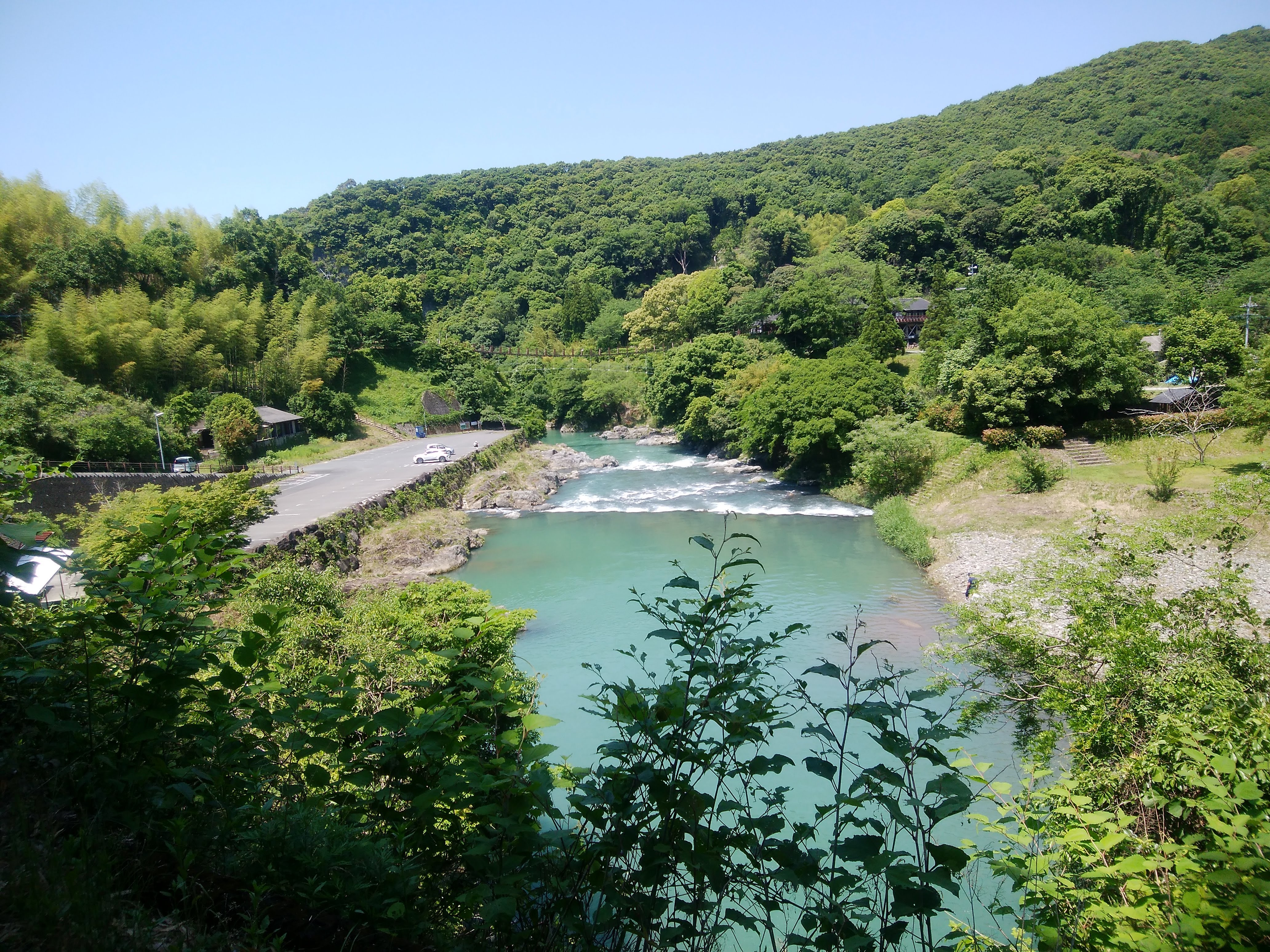 熊本県内を流れる氷川